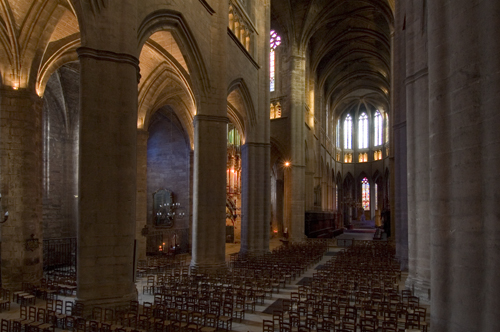 Intérieur de la cathédrale de Rodez